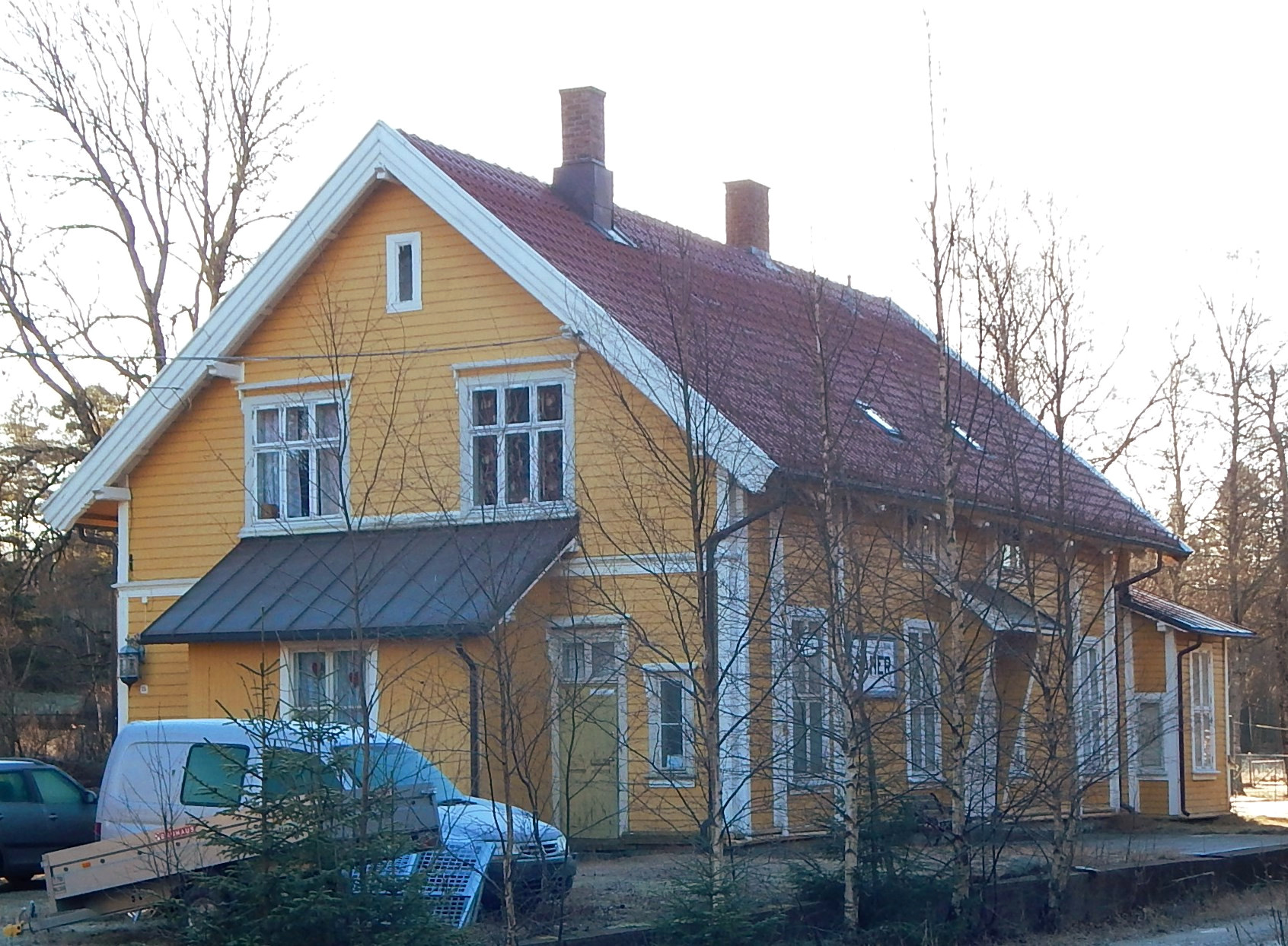 Såner stasjon anno 2017